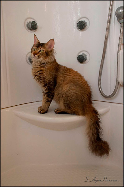 Female La Perm cat